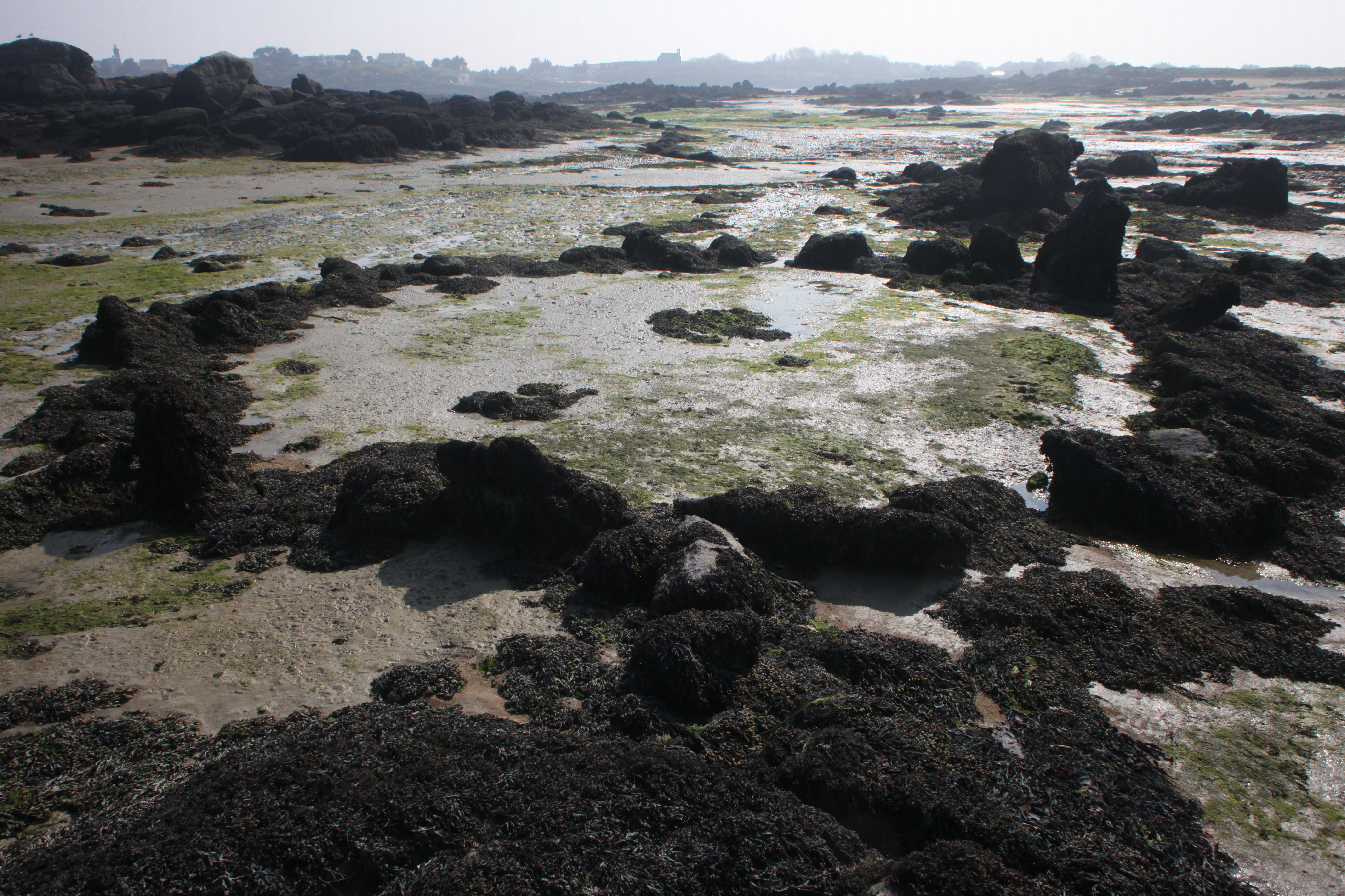 Le cromlech de l'Oeillet près du Petit Colombier. Cercle de pierre d'environ 12m de diamètre.